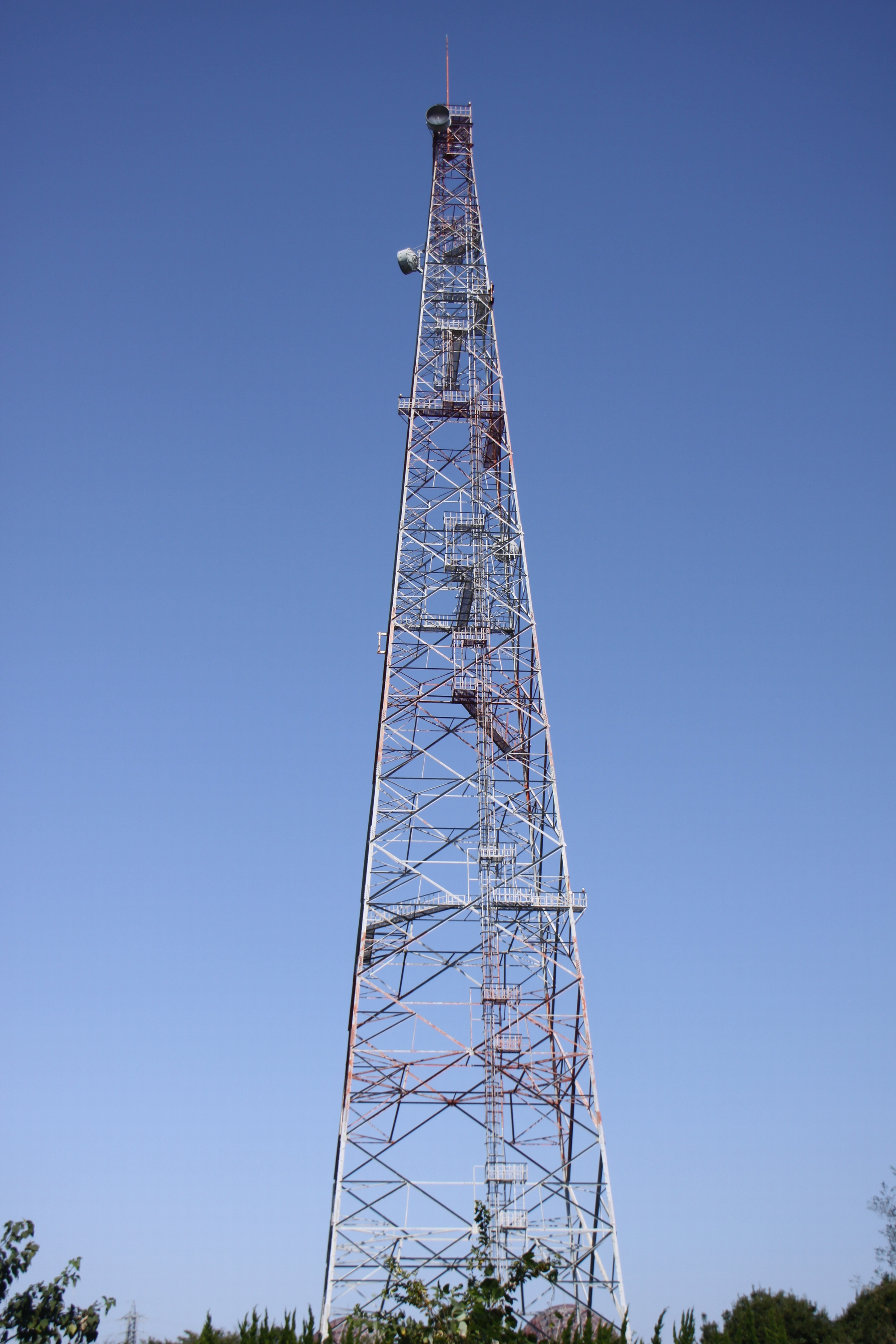 府中通信施設内にある通信用鉄塔